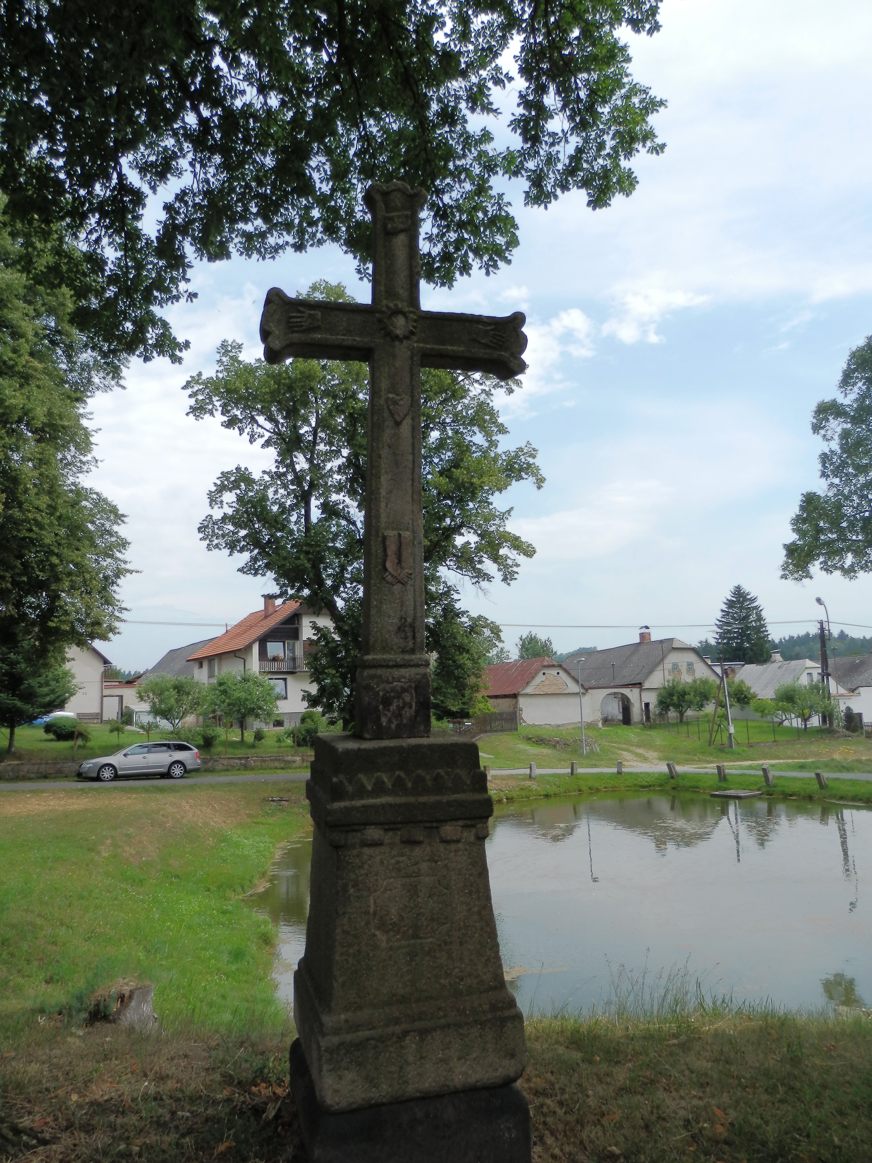 Kříž (Olešnice), náves, Olešnice